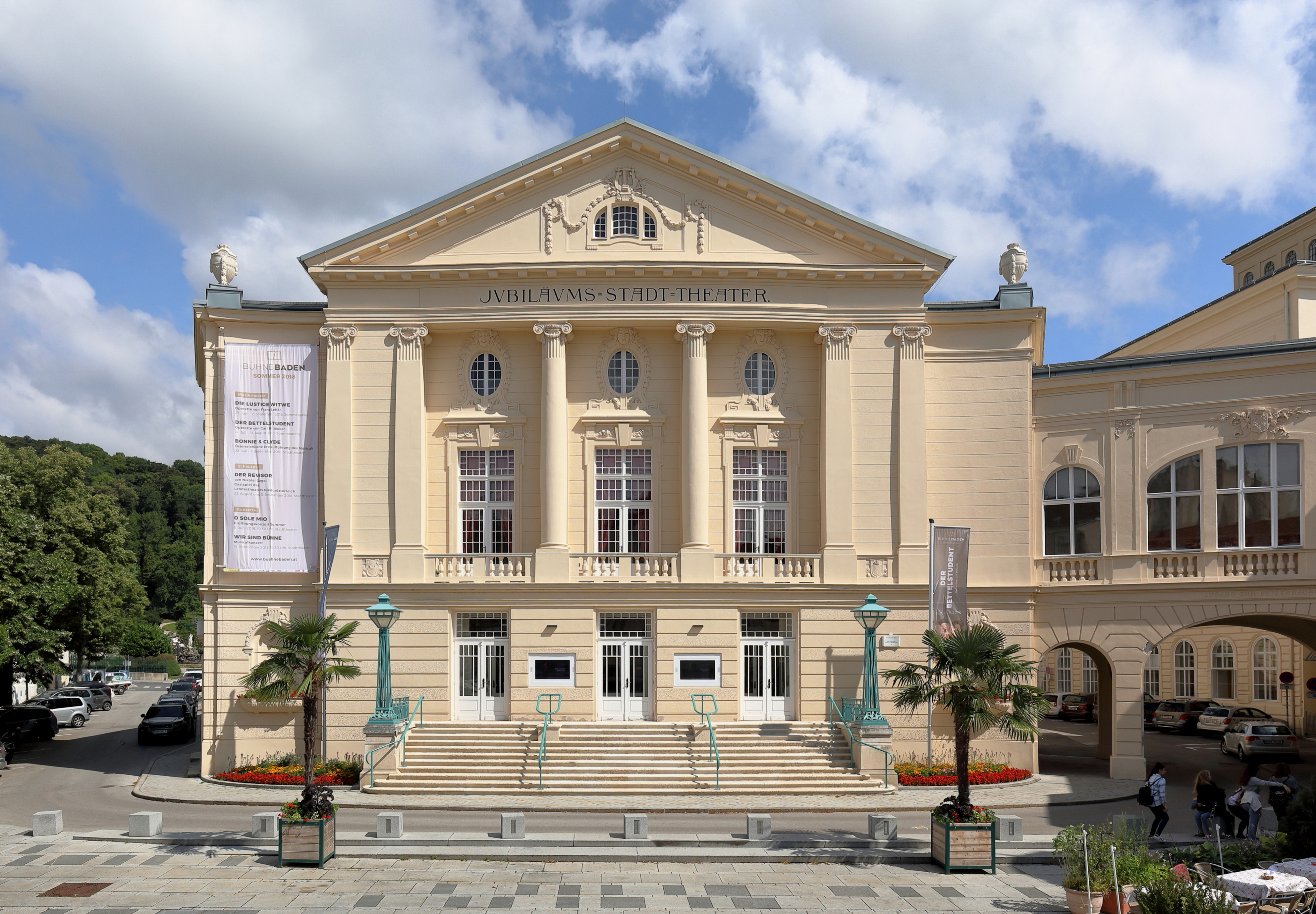 Das Jubiläums-Stadt-Theater an der Adresse Theaterplatz 7 in der niederösterreichischen Stadt Baden. Das Theater im neoklassizistischen Stil wurde nach dem Abriss des Vorgängertheaters 1908 an gleicher Stelle nach Plänen des Büros Fellner & Helmer errichtet und am 2. Oktober 1909 im Beisein von Erzherzog Rainer feierlich eröffnet.